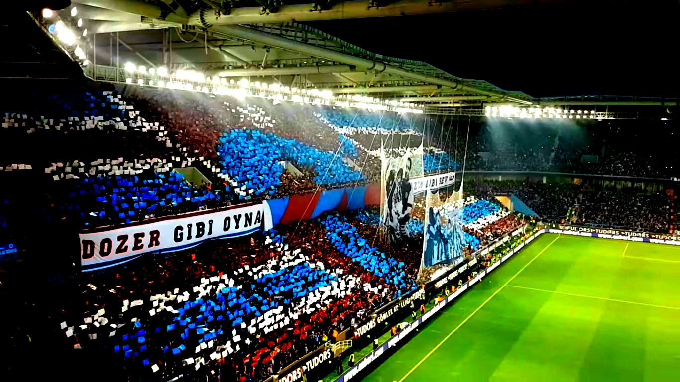 8 Nisan 2017 Trabzonspor - Beşiktaş Karşılaşması Öncesi Yapılan Koreografi